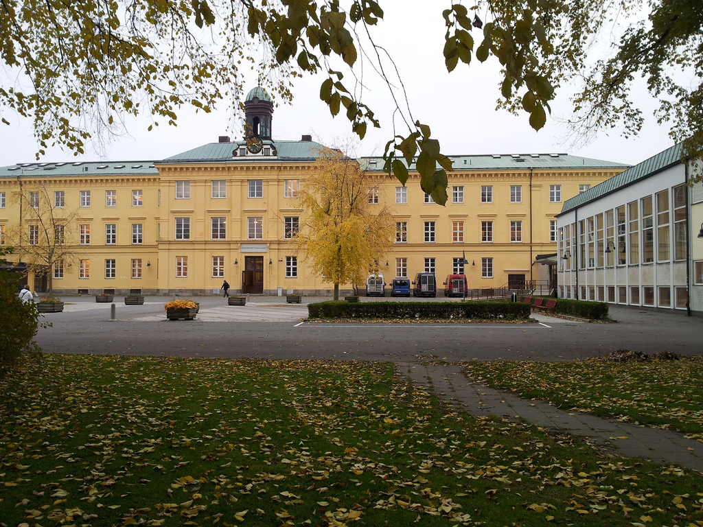 Söderportgymnasiet i Kristianstad. Huvudbyggnaden och aulan.